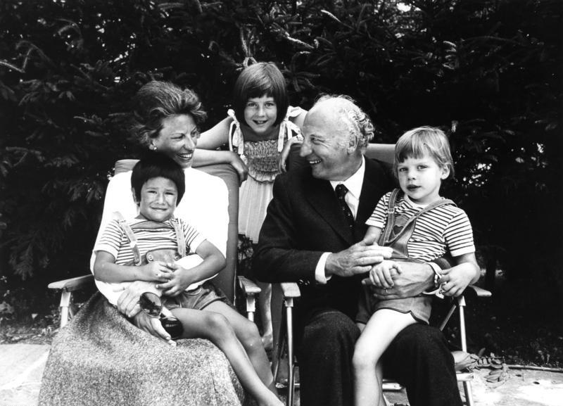 Bundespräsident Walter Scheel mit Frau Mildred und den Kindern Simon-Martin, Cornelia und Andrea (von links) in ihrem Urlaubsort Hinterthal (Österreich) am 19.8.1974